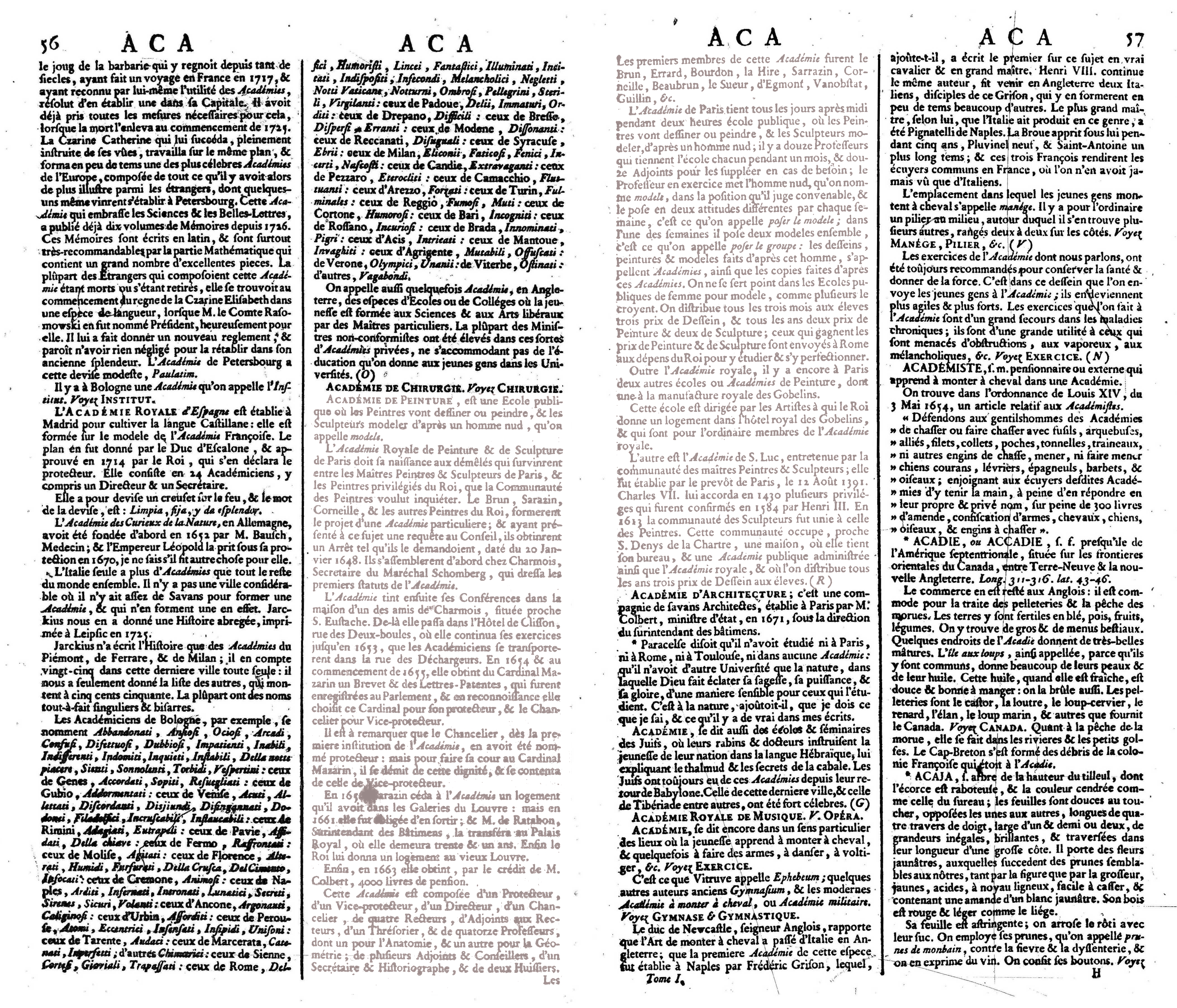 Denis Diderot: Encyclopédie, Band 1, 1751. – Artikel „Académie de Peinture“ von Paul Landois (schattiert), Seite 56-57.